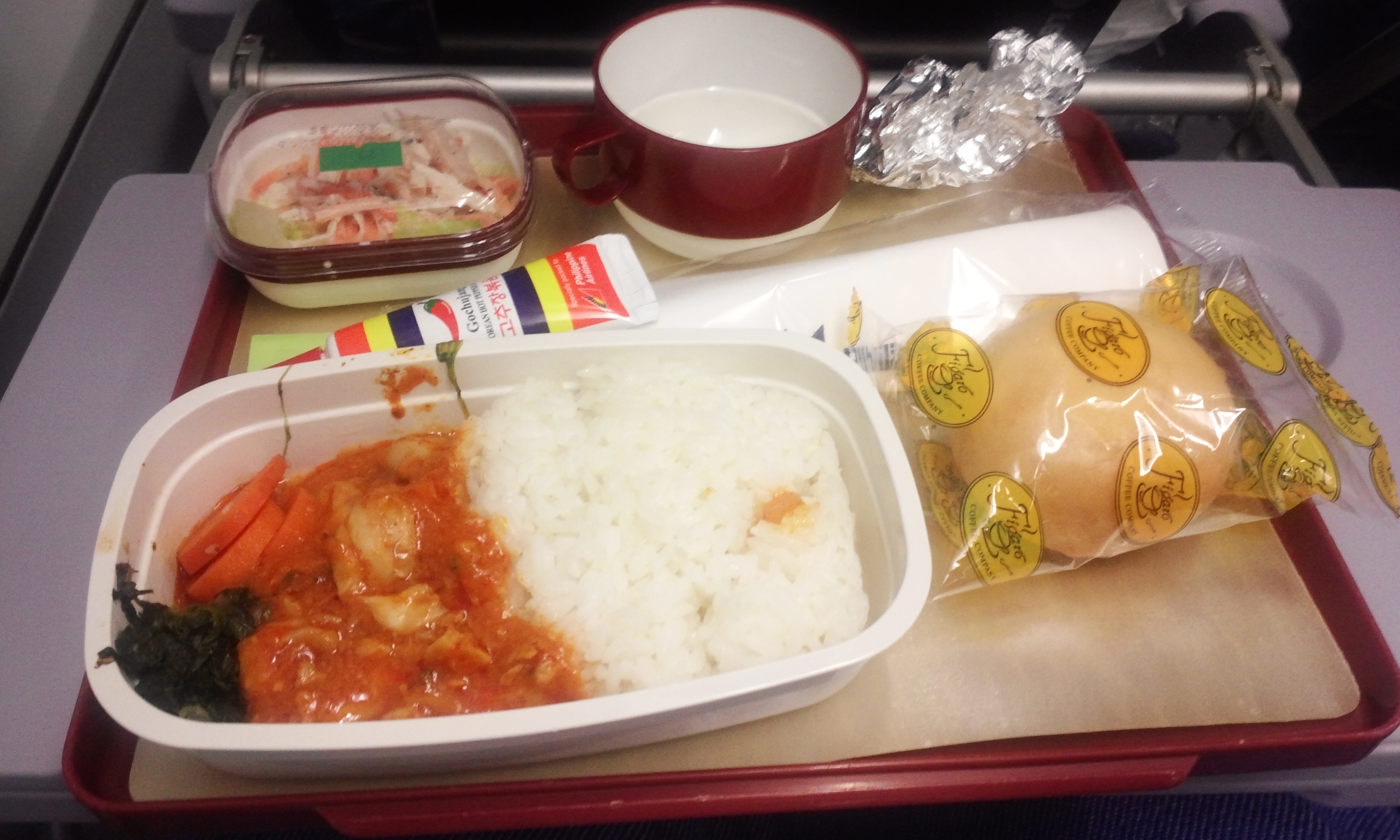 마닐라발 인천행 비행기에서 제공된 필리핀 항공의 기내식